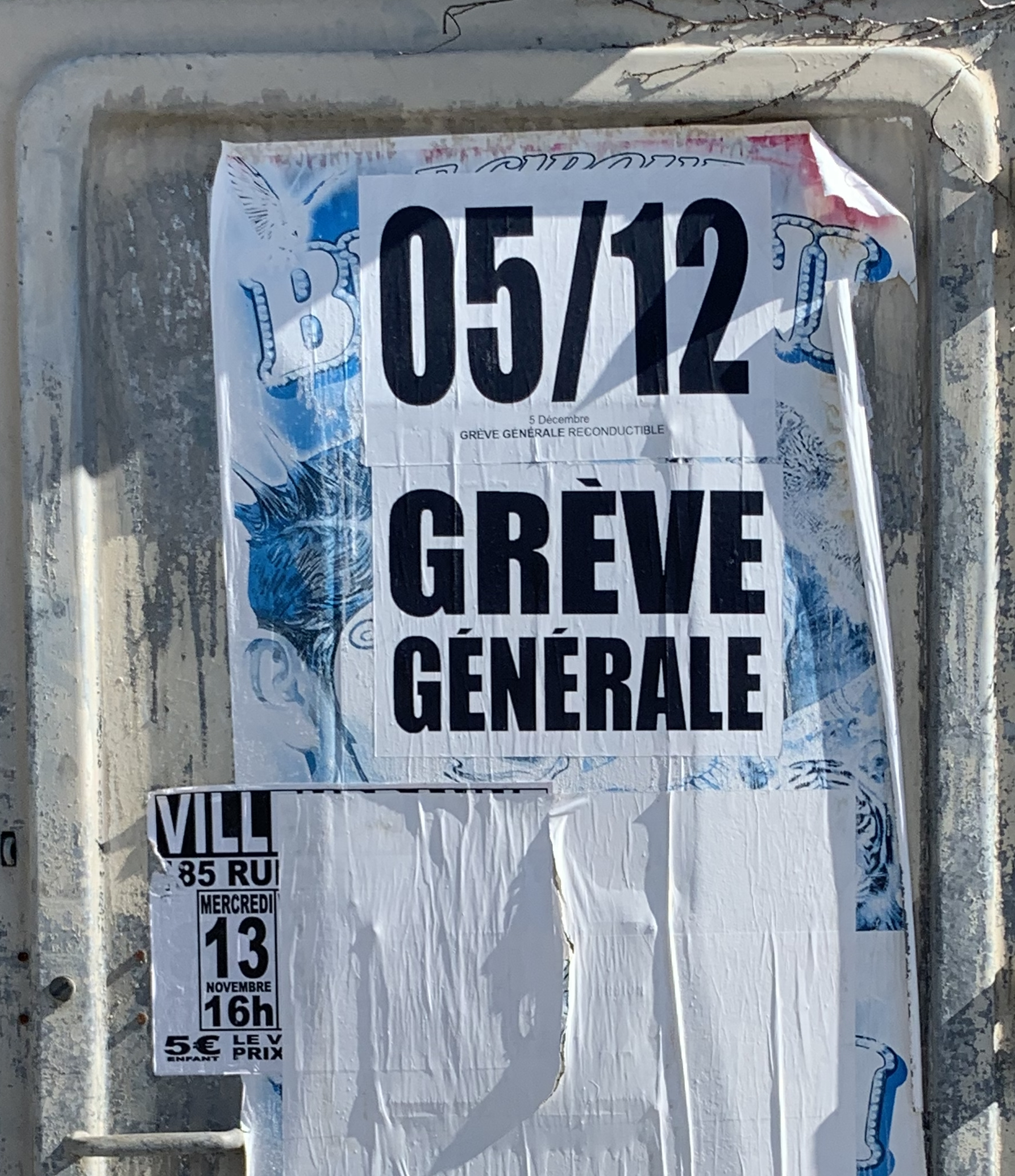 Appel à la grève générale, avenue Marcel Cerdan (Villeurbanne).